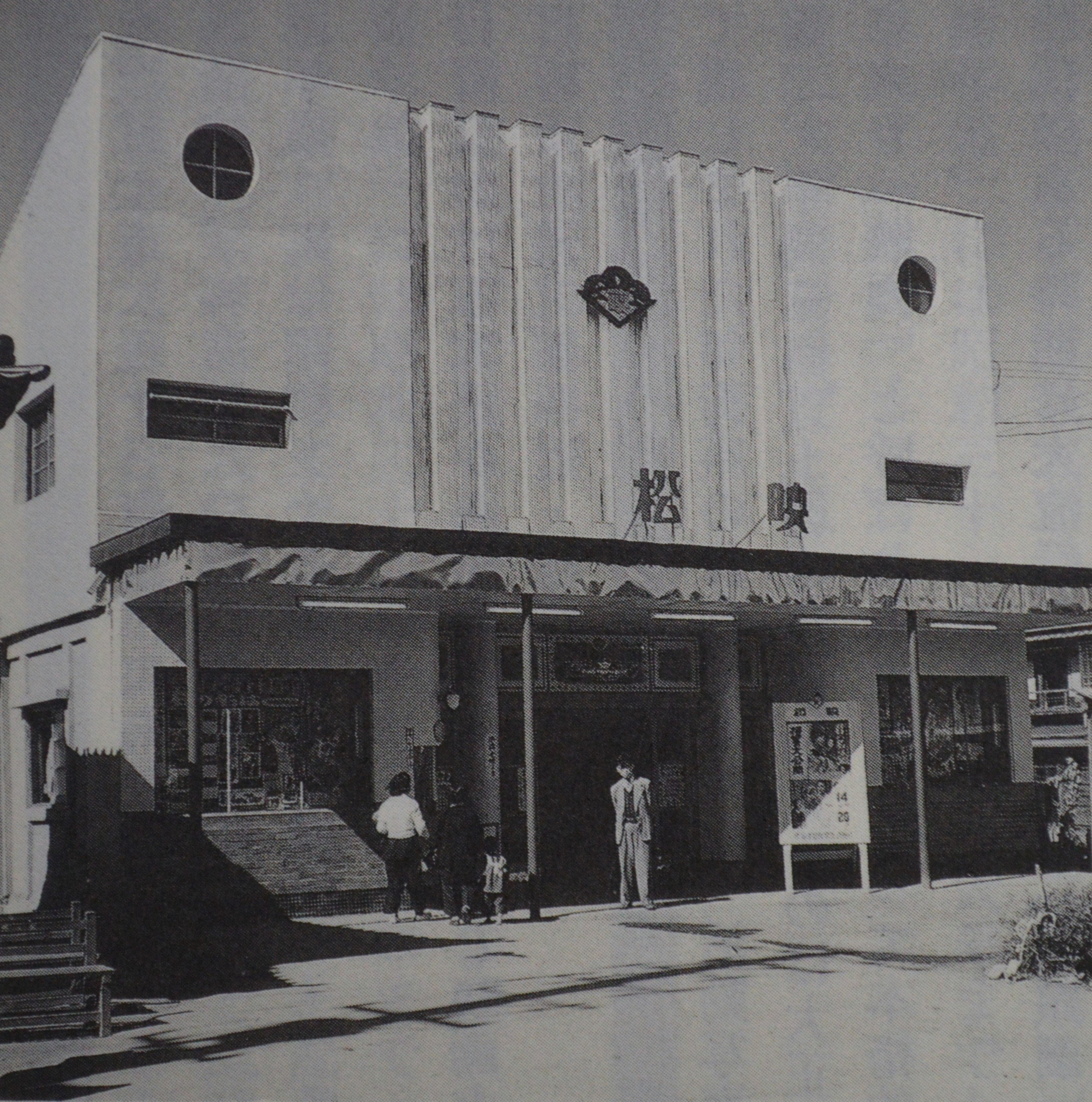 新潟県十日町市にあった十日町松映。1953年の開館直後。後の十日町松竹。